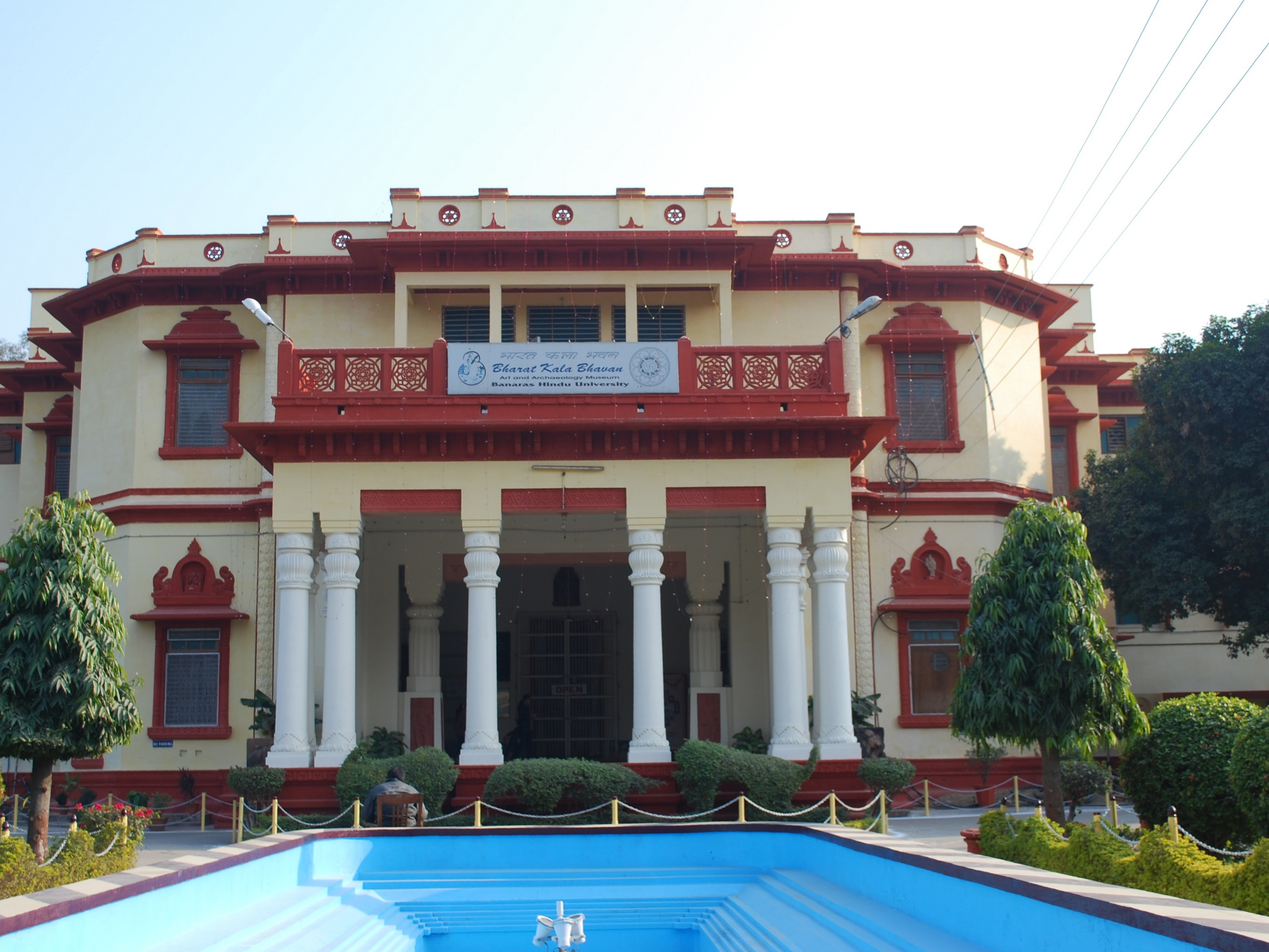 Bharat Kala Bhavan Museum, Varanasi Hindu University